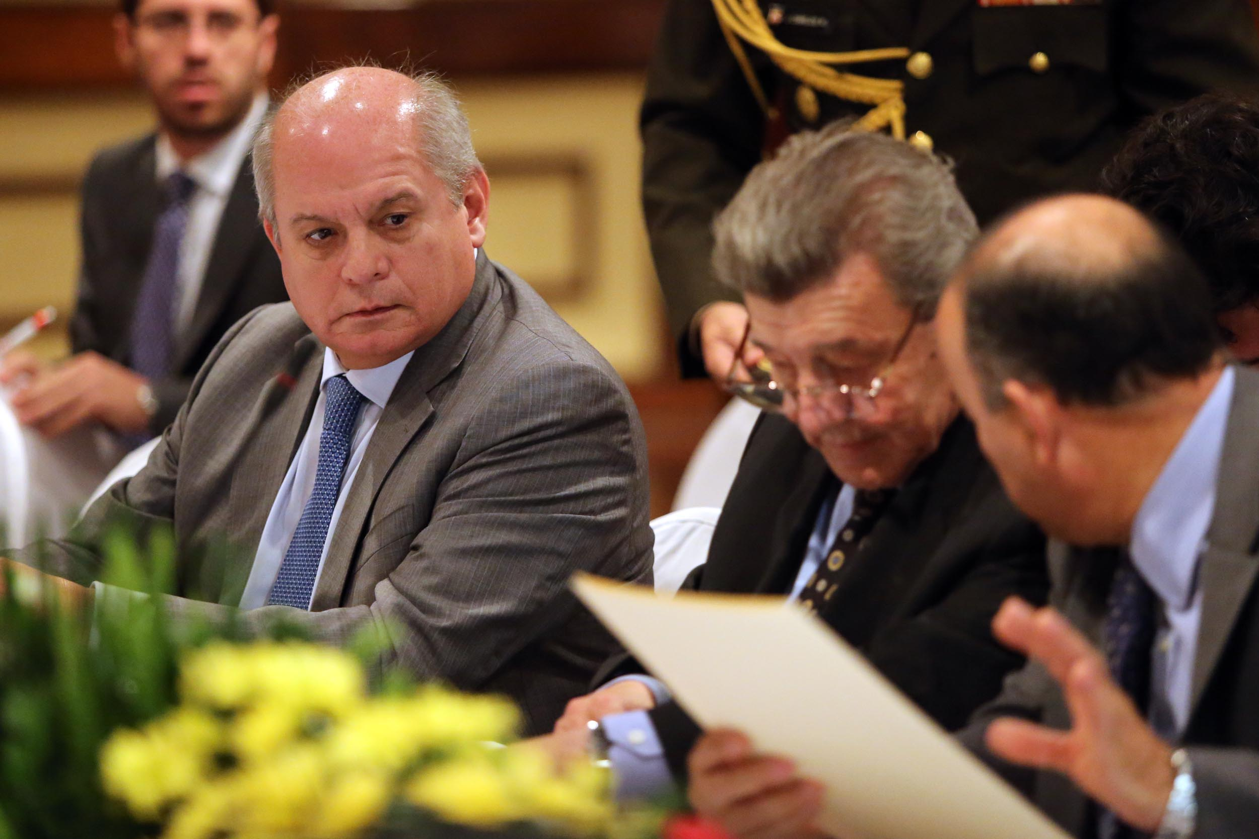 El MInistro de Defensa, Pedro Cateriano y el Ministro de Relaciones Exteriores, Rafael Roncagliolo, presiden la II Reunión del Mecanismo de Consulta y coordinación 2+2 Bolivia-Perú, en la ciudad de Santa Cruz, Bolivia.